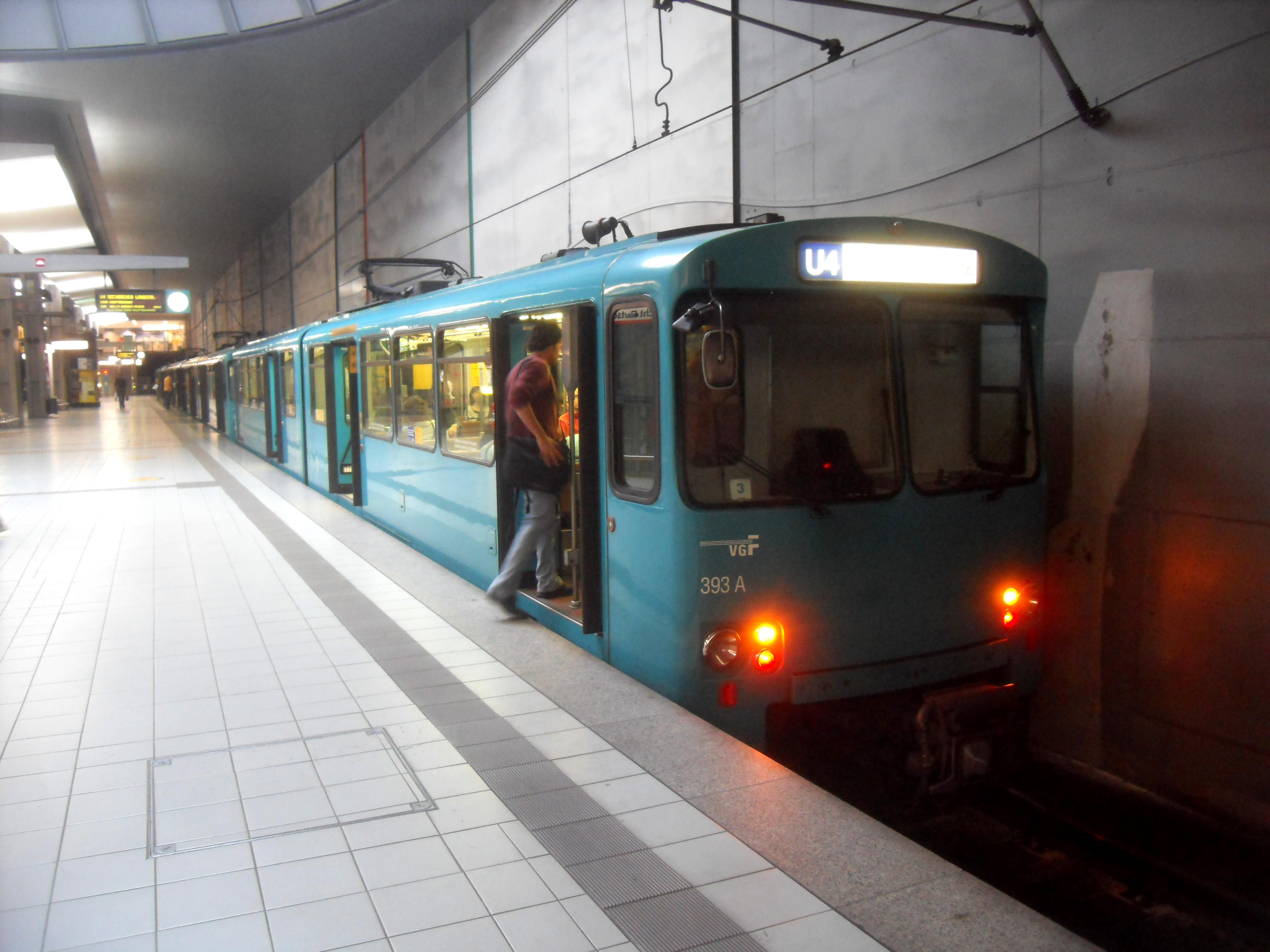 U 2-Triebwagen im U-Bahnhof Festhalle/Messe der U-Bahn Frankfurt auf der Linie U 4 auf dem Weg nach Seckbacher Landstraße in Hessen (Deutschland)